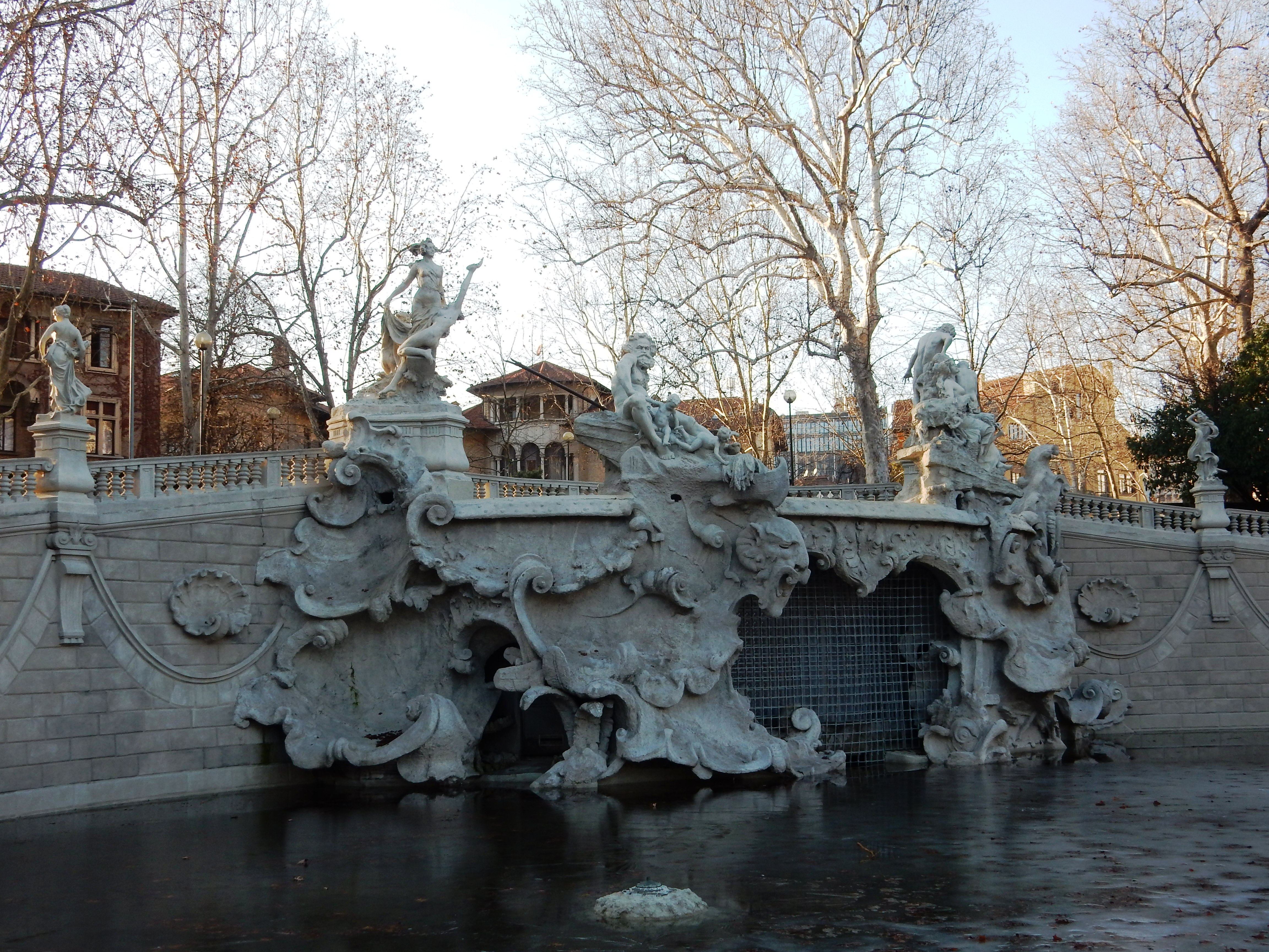 Fontana dei 12 mesi ristrutturata (inizio 2018)